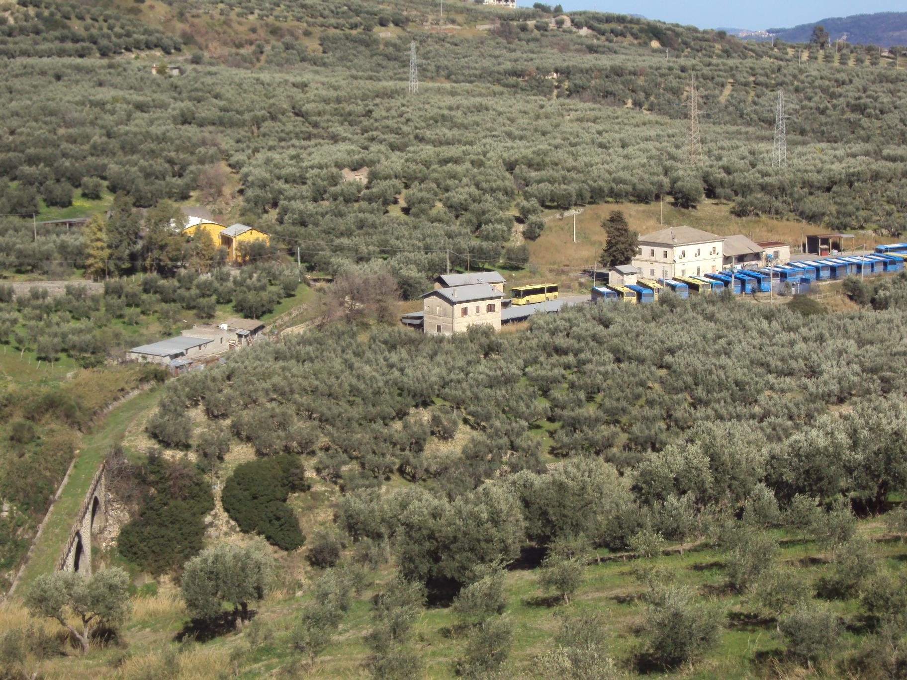 Stazione di Petilia Policastro, parte della dismessa linea Crotone - Petilia Policastro